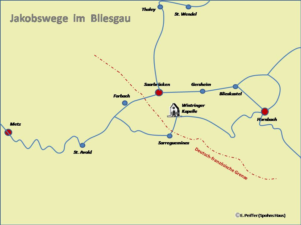 Jakobswege im Bliesgau und in den Nachbarregionen (Saarpfalz-Kreis und Lothringen): geographische Karte